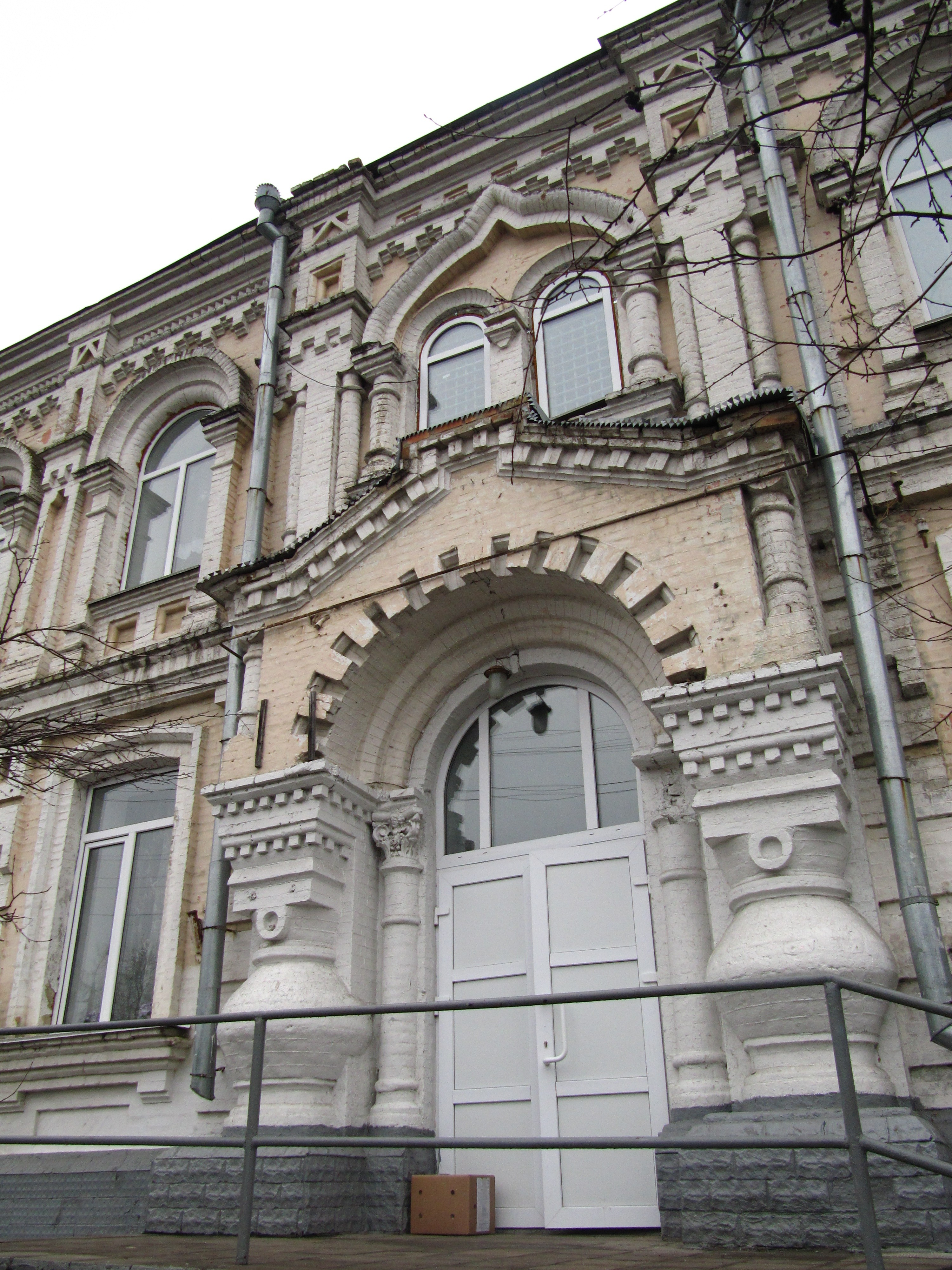 Старий будинок у Василькові